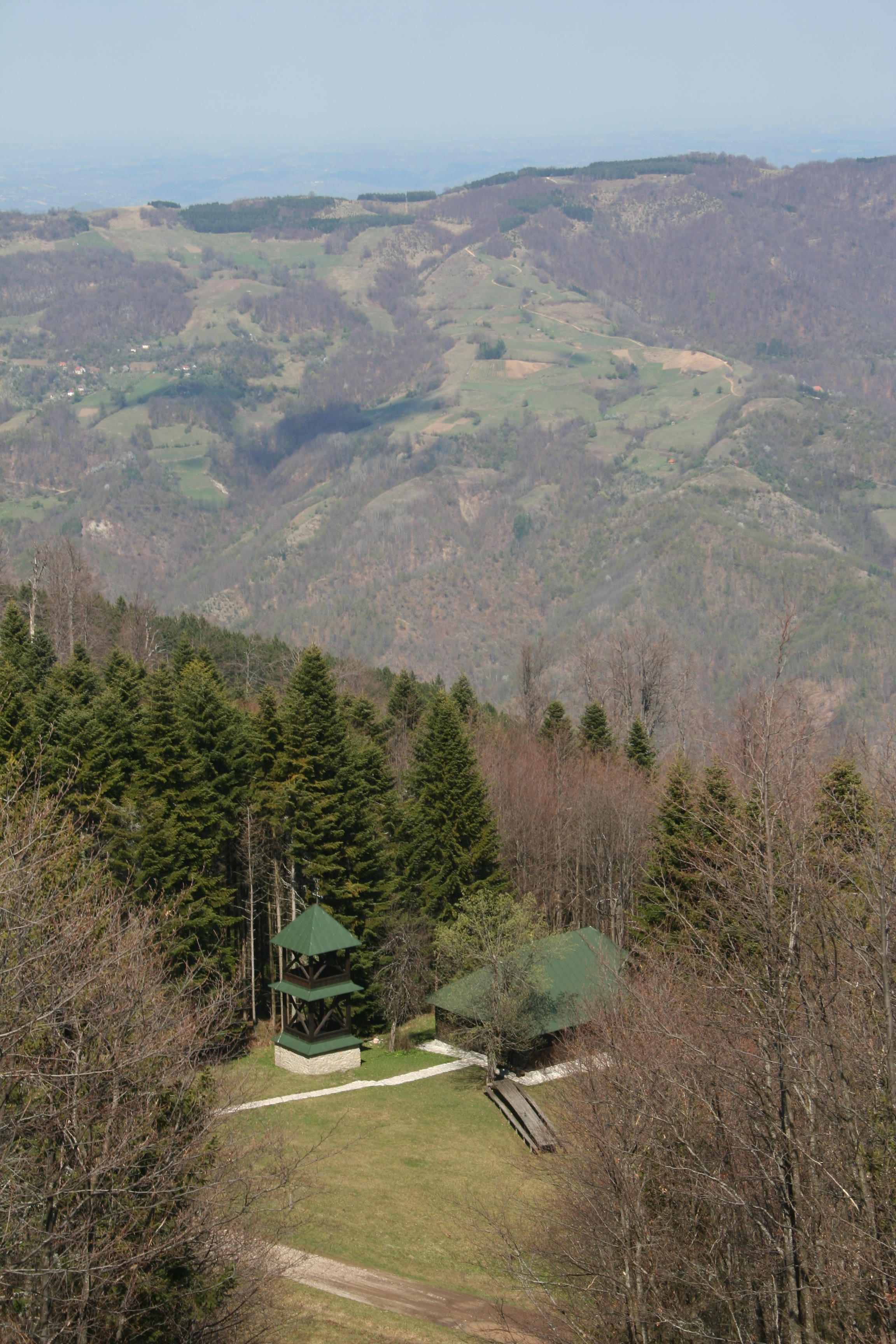 Crkva brvnara na Bobiji